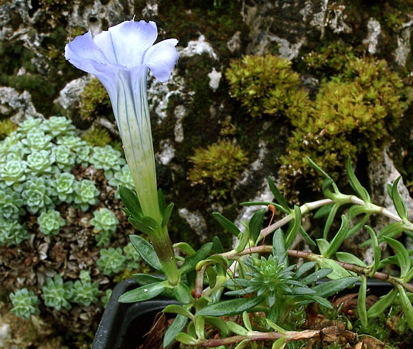 Plante vivace de la Chine (sud-ouest du Sichuan,nord-ouest du Yunnan et sud-est du tibet) sur pelouses alpine, entre 3800 et 4600 m. (Photo en culture)